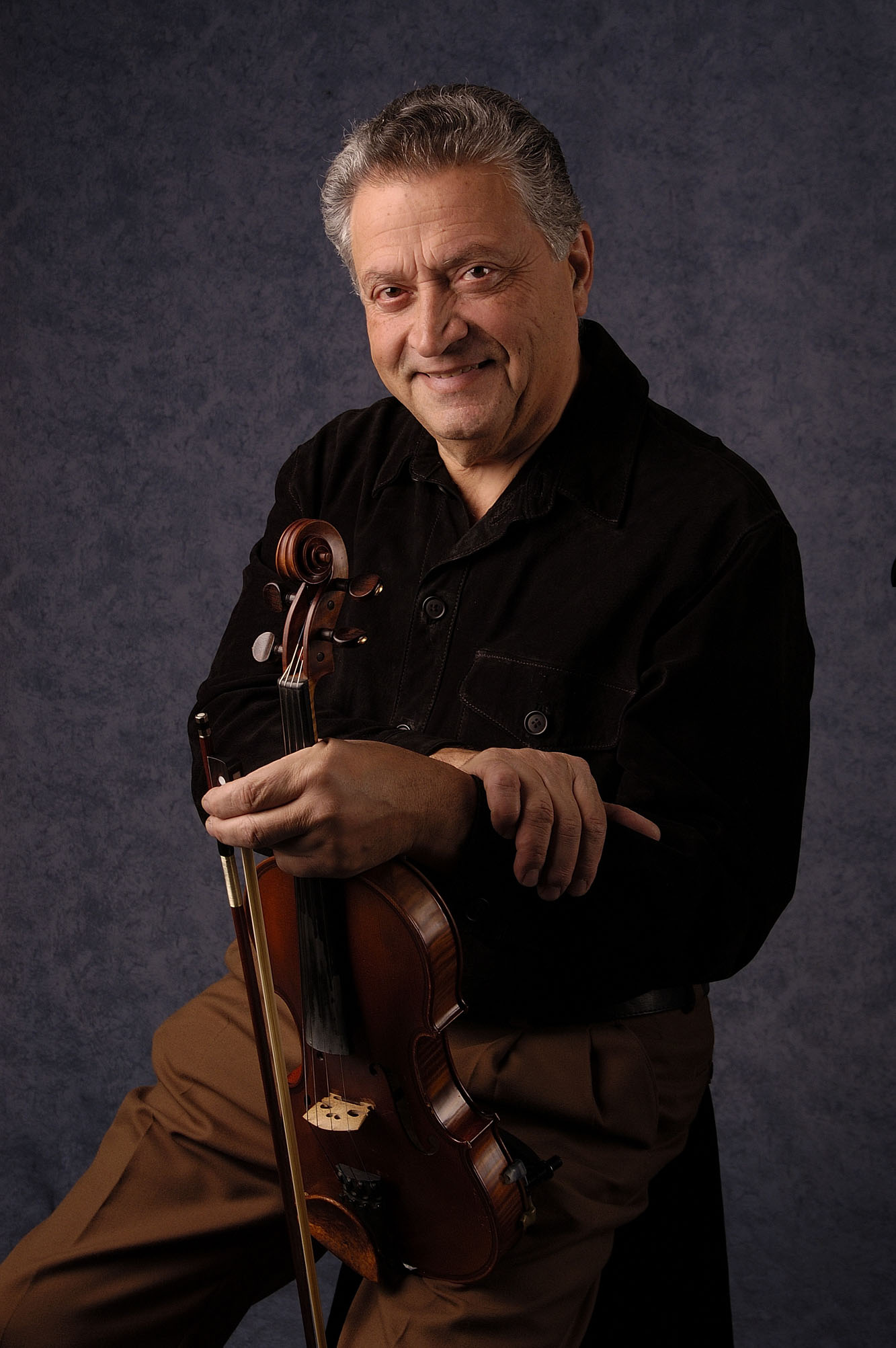 Leonid Greco